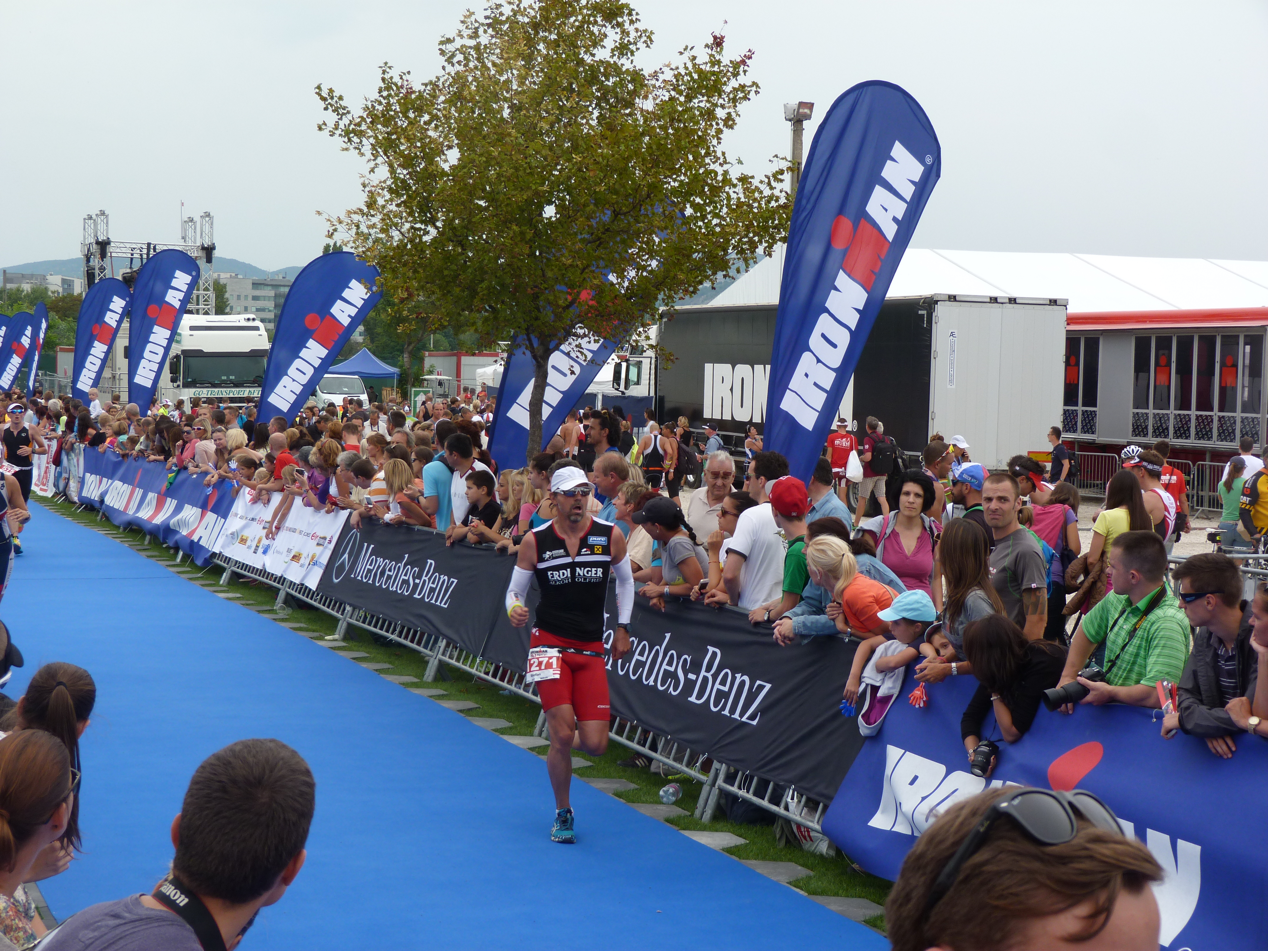 A felvételek 2014. augusztus 23-án, szombaton készültek Budapesten, a Kopaszi-gáton. Ironman 70.3. A triatlon versenysorozat 2006-ban indult az eredeti IRONMAN versenytávok felén. A 2014. augusztus 23-án Budapesten megrendezett IRONMAN 70.3 sporttörténeti esemény: Budapest az első közép-kelet európai város ahol IRONMAN logó alatt triatlon versenyt szerveztek. ©© Derzsi Elekes Andor, Budapest 2014, You are authorised to use these photos and vids under Creative Commons – even for commercial, for profit purposes. Photos must be attributed to Derzsi Elekes Andor. All of the photos and vids in the Metapolisz DVD line are under Creative Commons and can be used even for commercial – for profit – purposes. Recommended Citation Derzsi Elekes Andor: Metapolisz DVD line